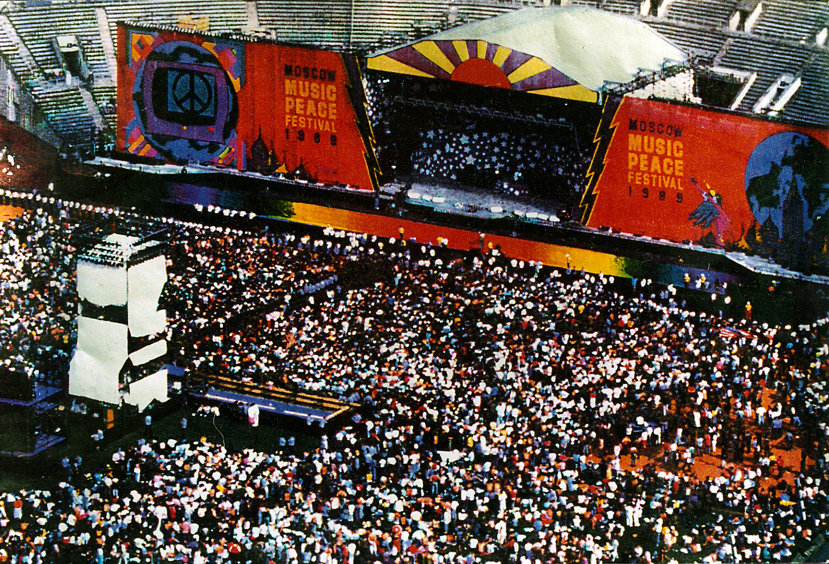 фестиваль в лужниках2